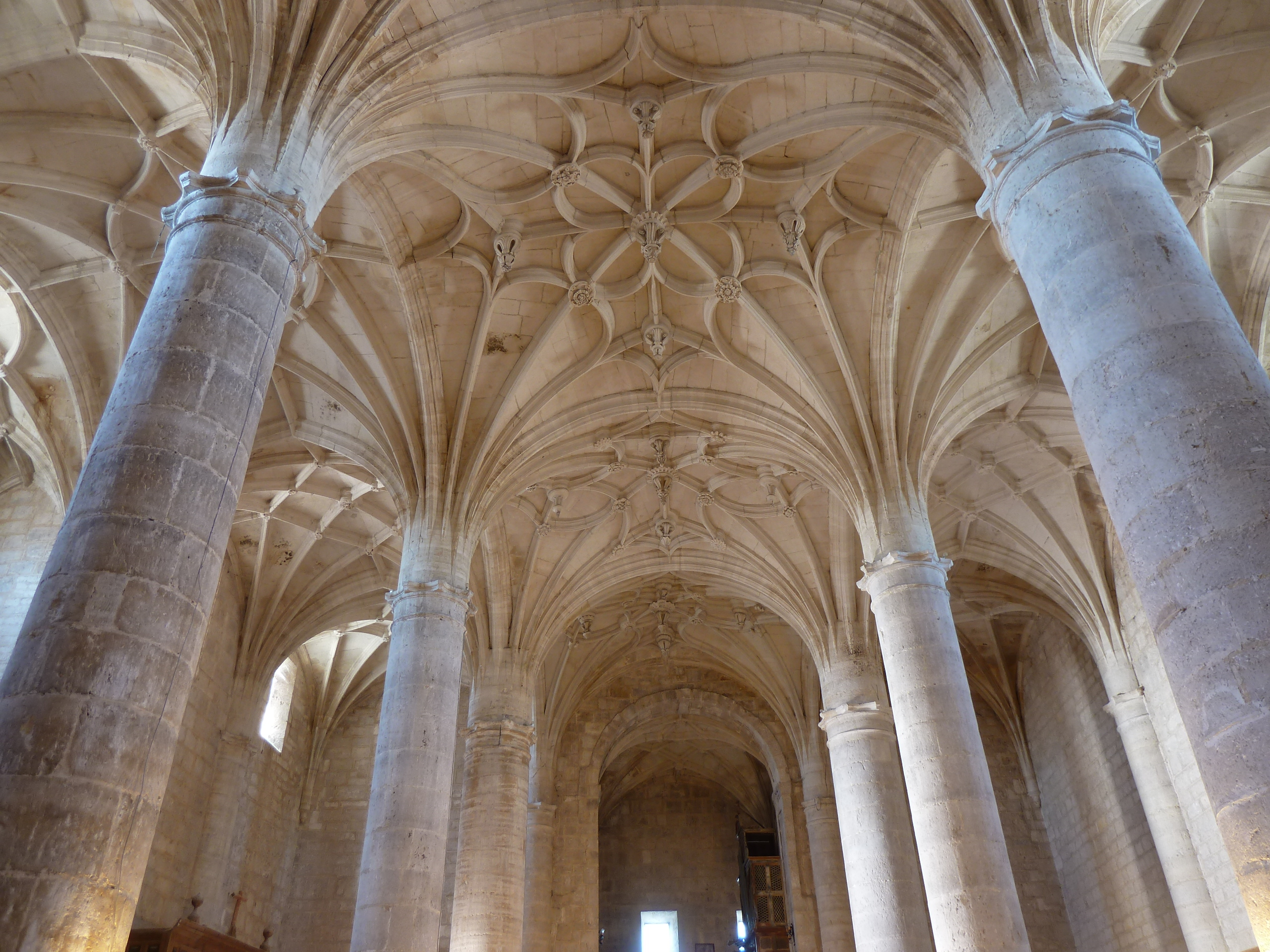 Vista de la bóveda desde el presbiterio hacia los pies de la iglesia.